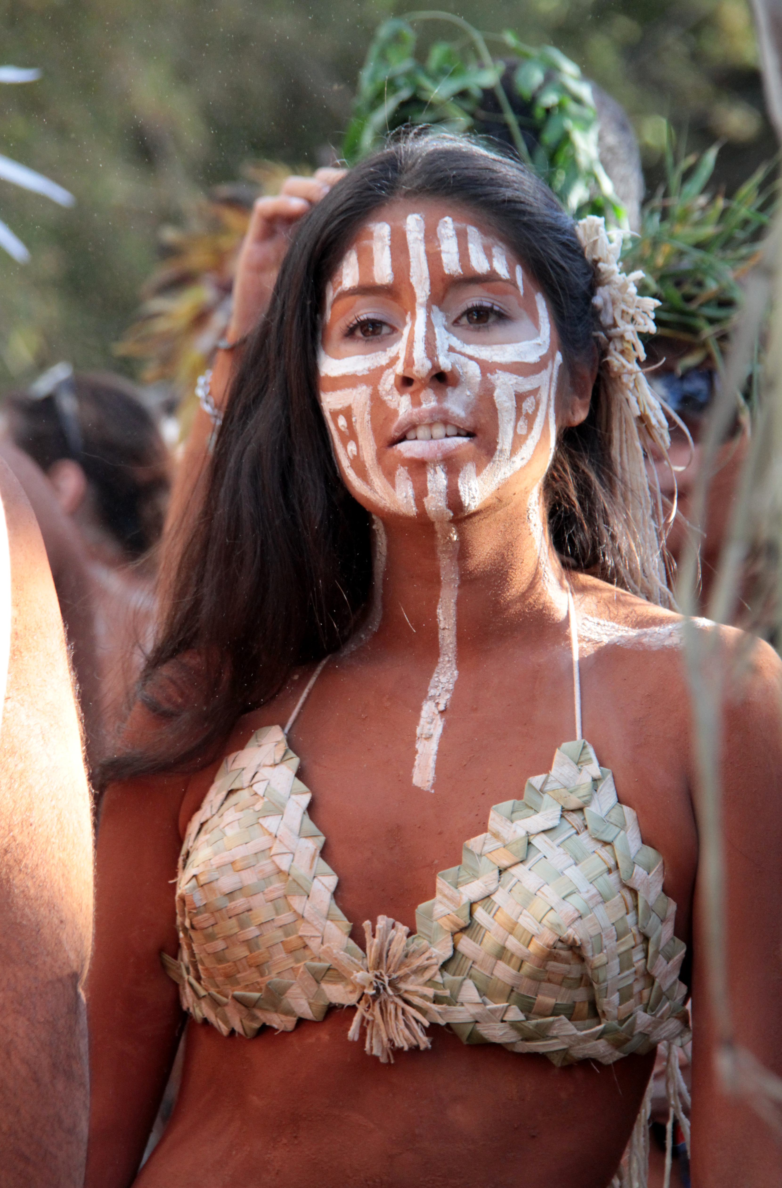 festival tapati sur l'ile de paques